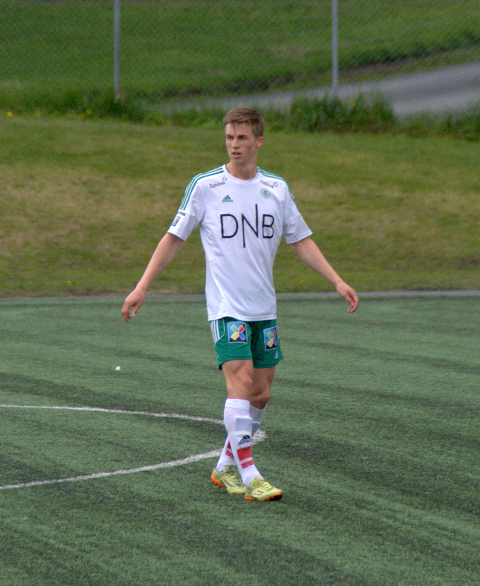 Fredrik Sjølstad for Hamarkameratene